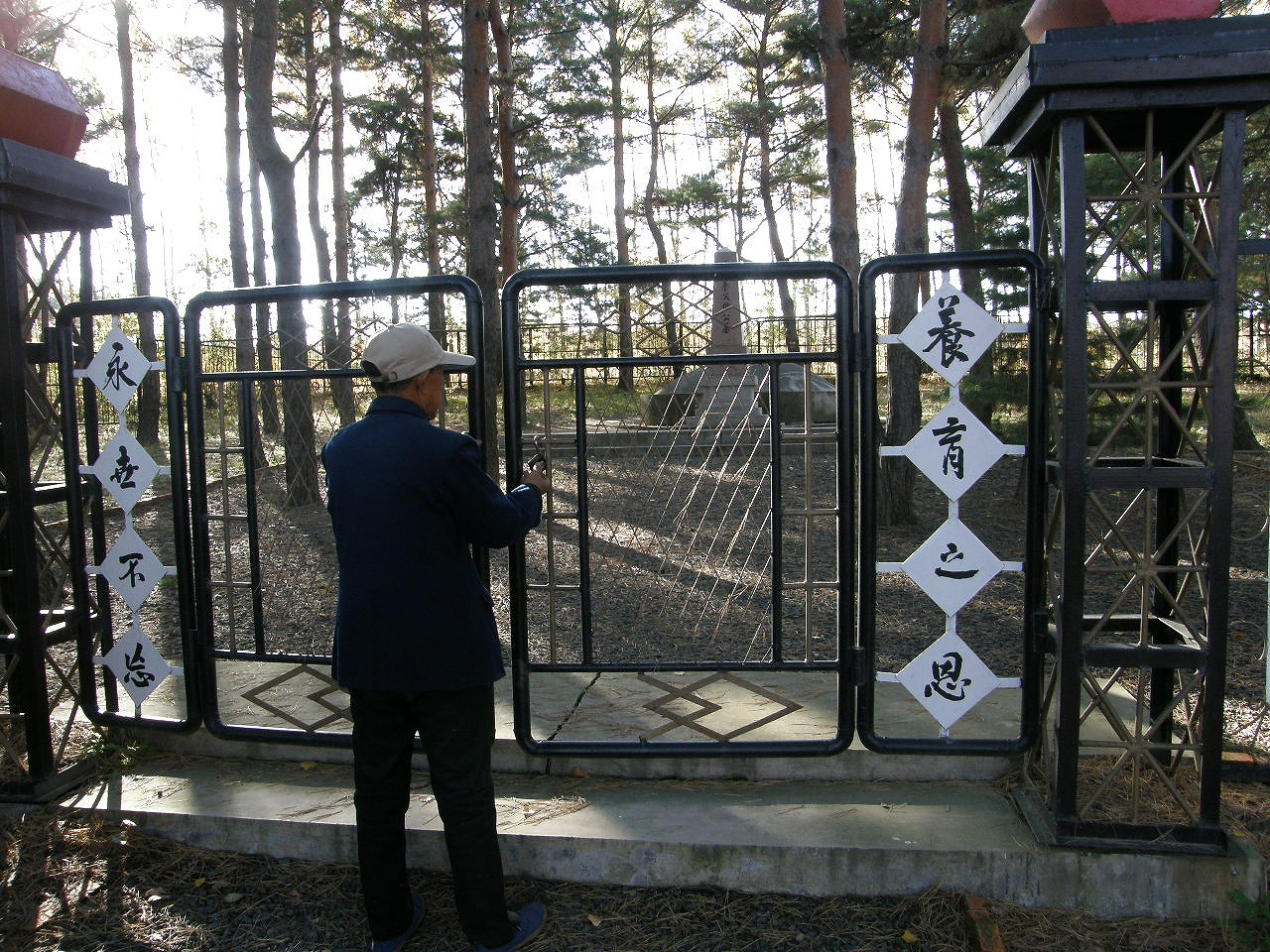 中国残留孤児方正地区日本人公墓